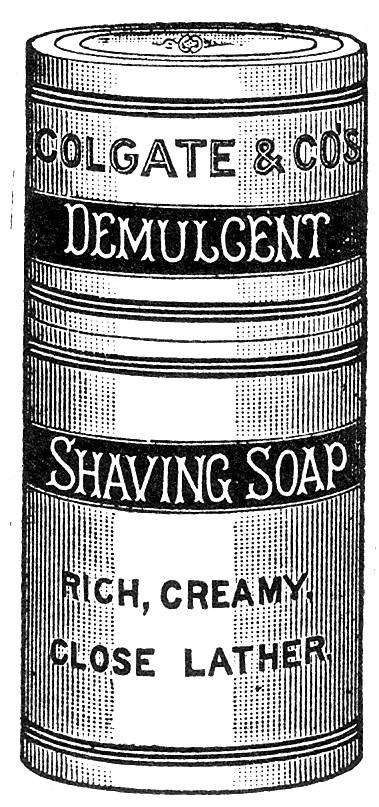 פרסומת לסבון גילוח, 1851